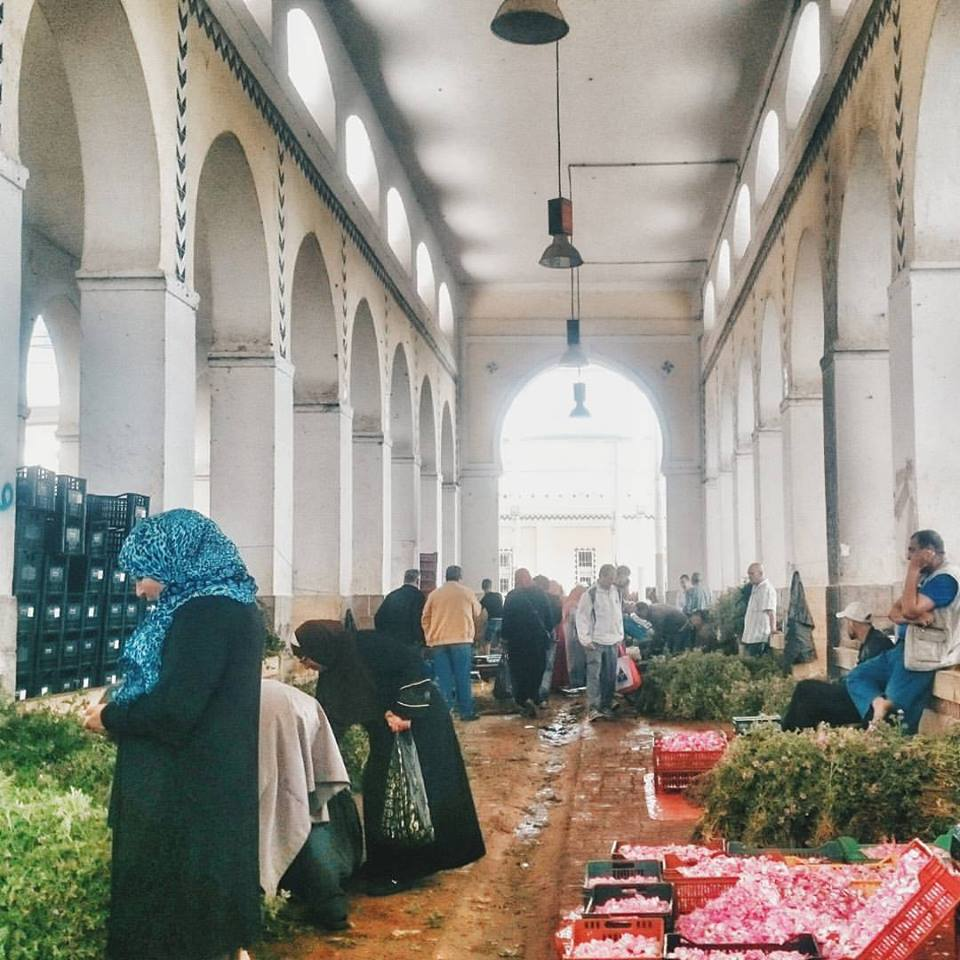 بائعوا الورود و الأزهار بالسوق المركزية بتونس This is an image of "African people at work" from Tunisia